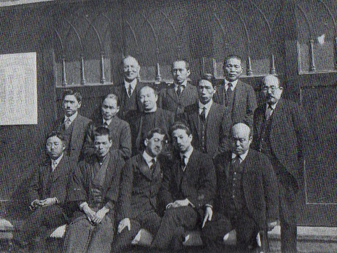 車田秋次ら教職者たち、神田ホーリネス教会にて